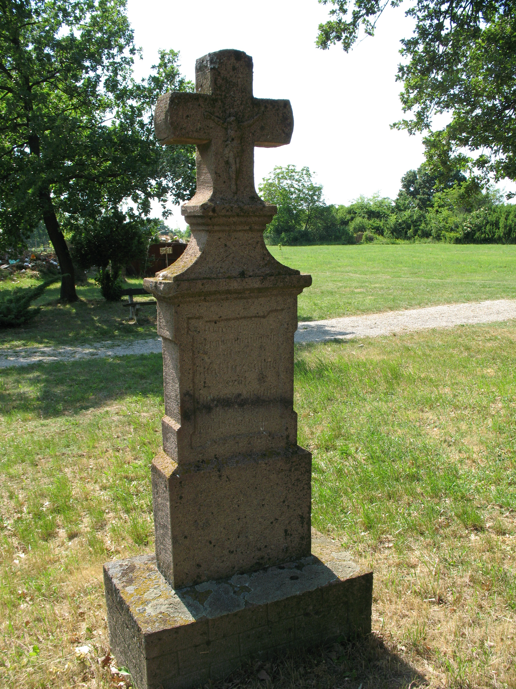 Nemespann temető Gaál Józsefné Juhász Antónia